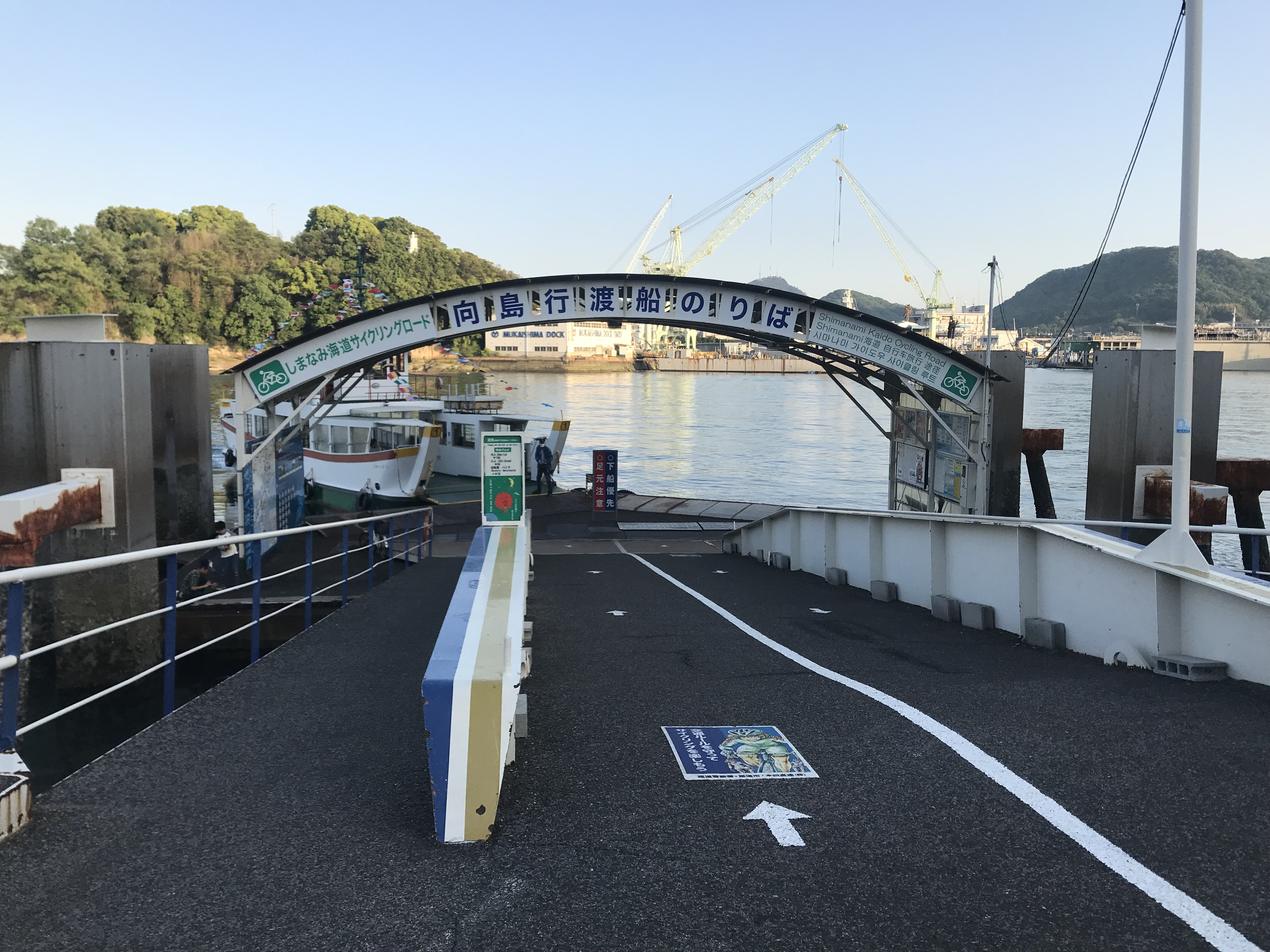 向島運航・尾道駅前渡船のりば